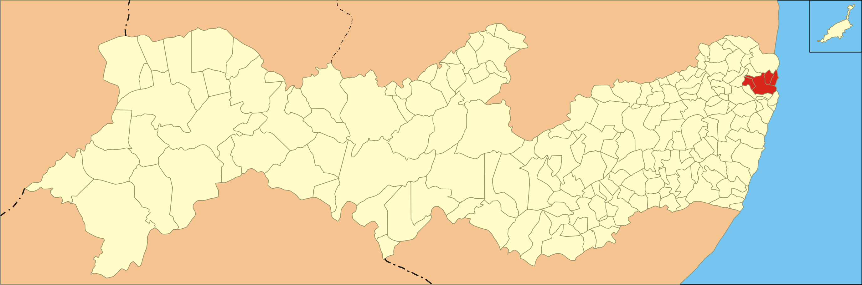 Localização da microrregião no estado de Pernambuco.